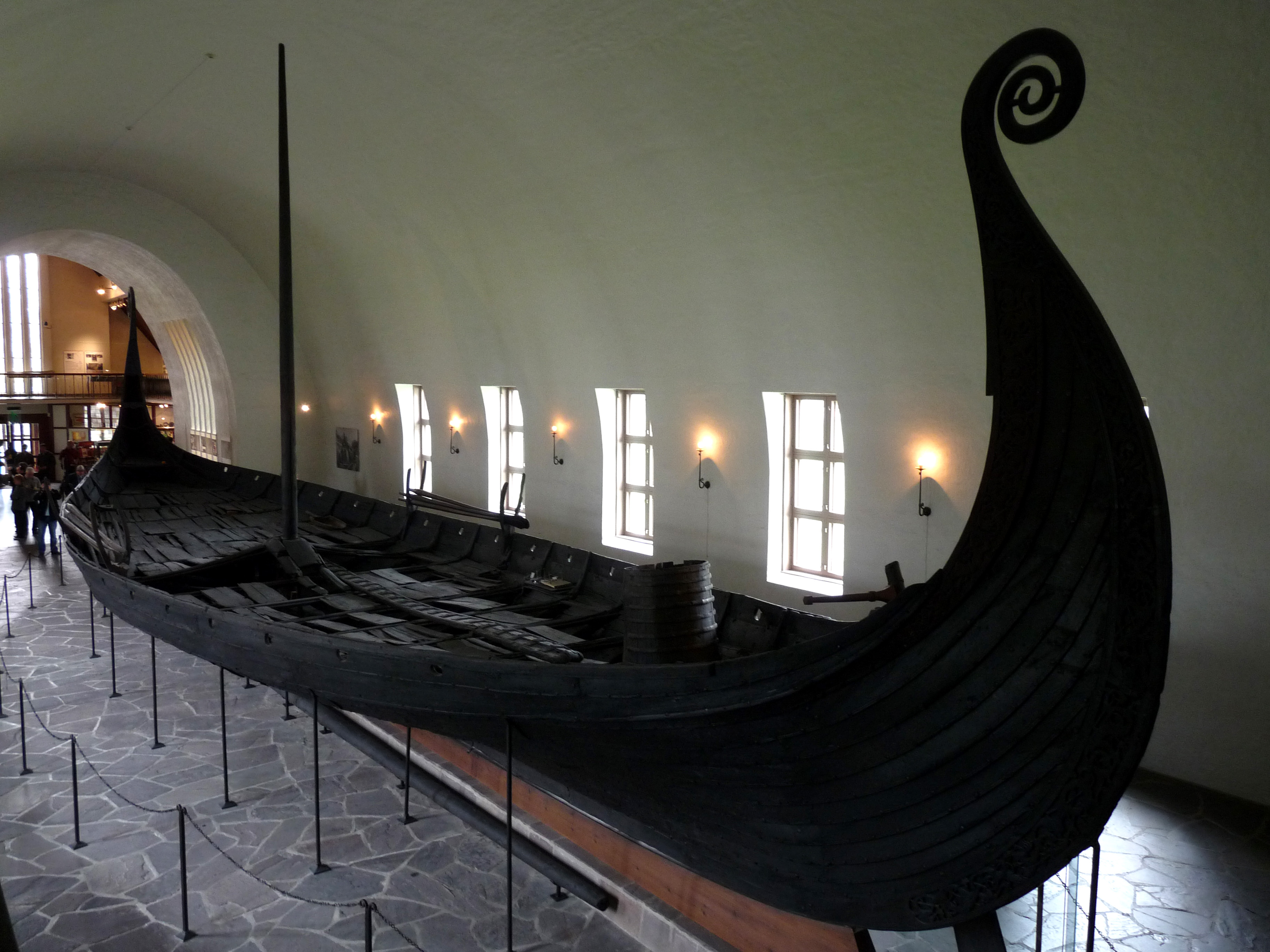 Navire des Vikings au muséum d'Oslo